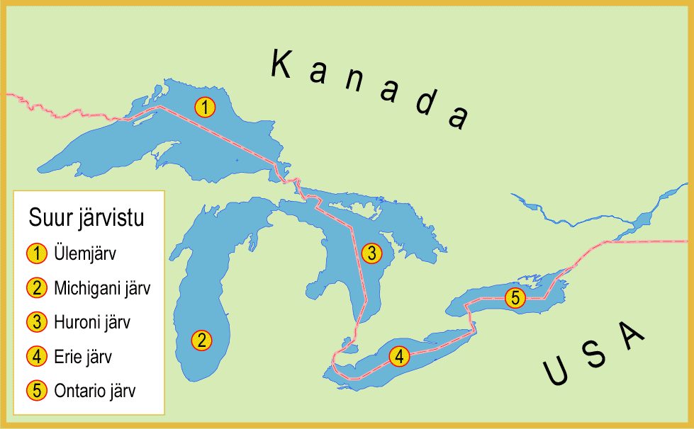 Suure järvistu kaart